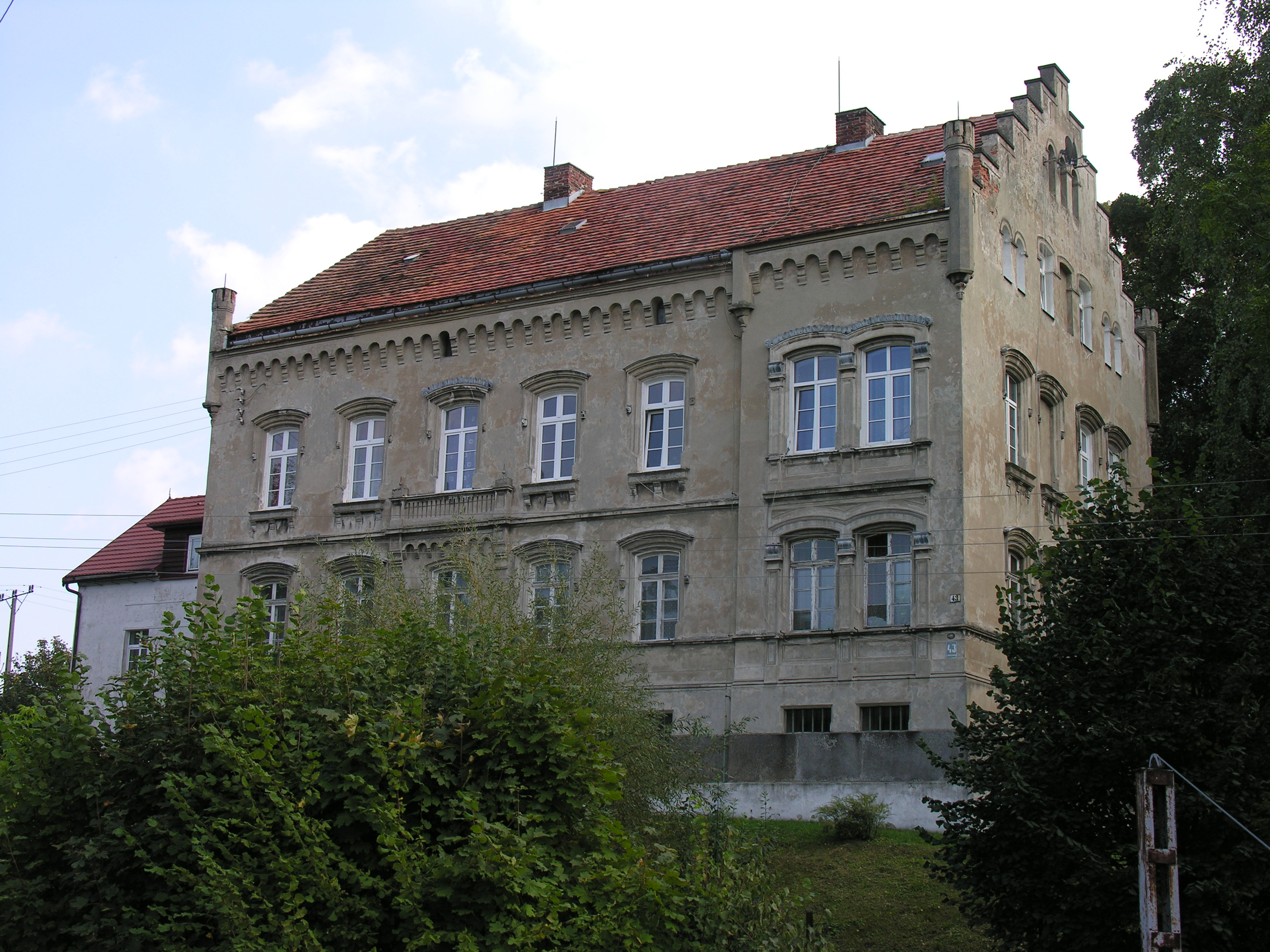 Świebodzice, ul. Sikorskiego 43 - fasada willi Jana Mikulicza-Radeckiego